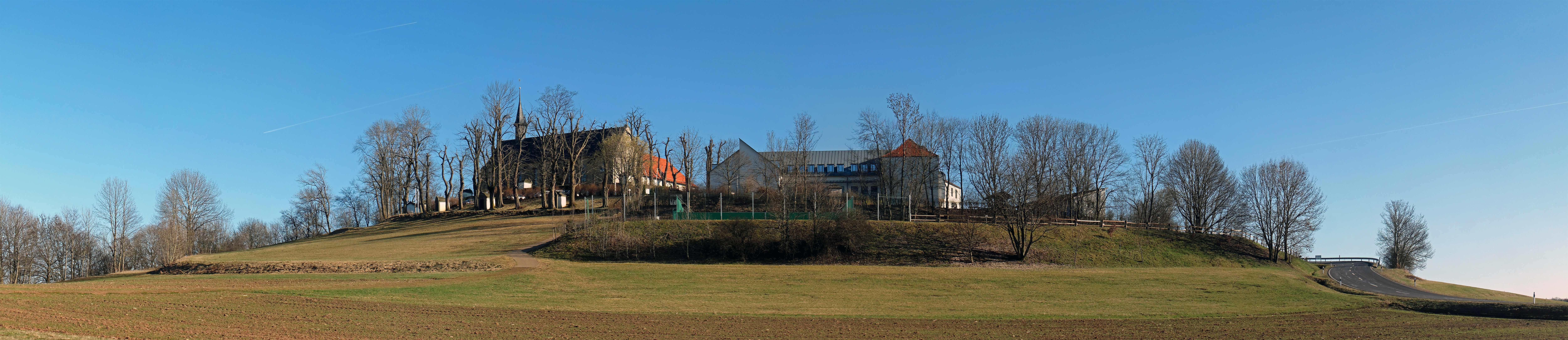 Der Volkersberg ist ein 552 Meter über Normalnull hoher Berg im Bayerischen Teil der Rhön. Auf dem Berg befindet sich das ab dem Jahre 1661 erbaute Kloster Volkersberg (links) und der 1956 und 1966 erbauten Jugendbildungsstätte (rechts). Diese Datei wurde mit Hugin erstellt.